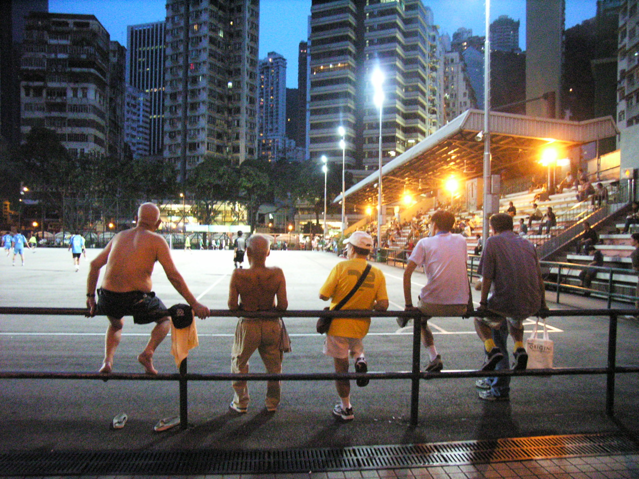 今日的修頓場依舊熱鬧，下象棋，乘涼，足球，打籃球，各適其適，十足自我風格